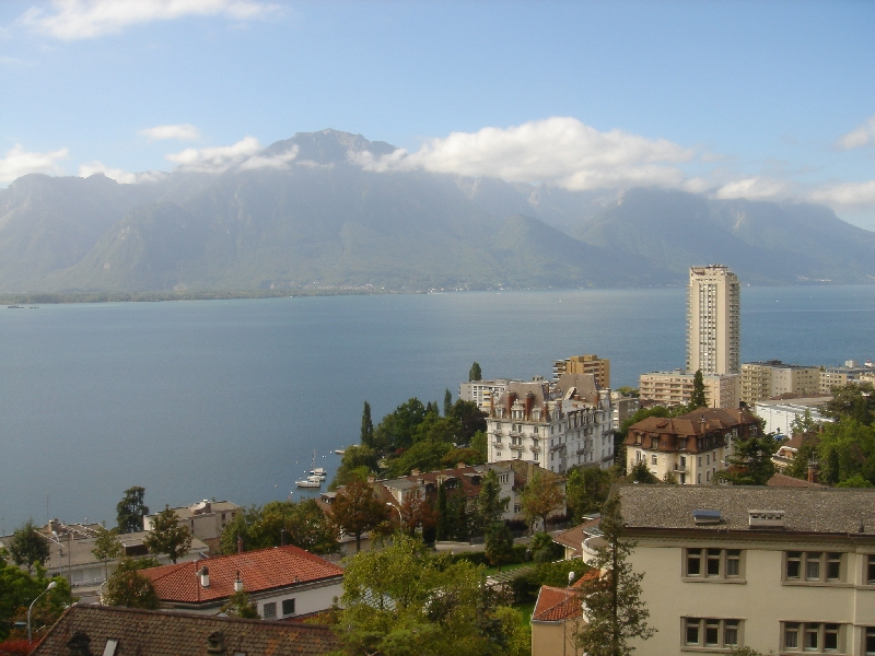 Montreux, Blick zum Chablais